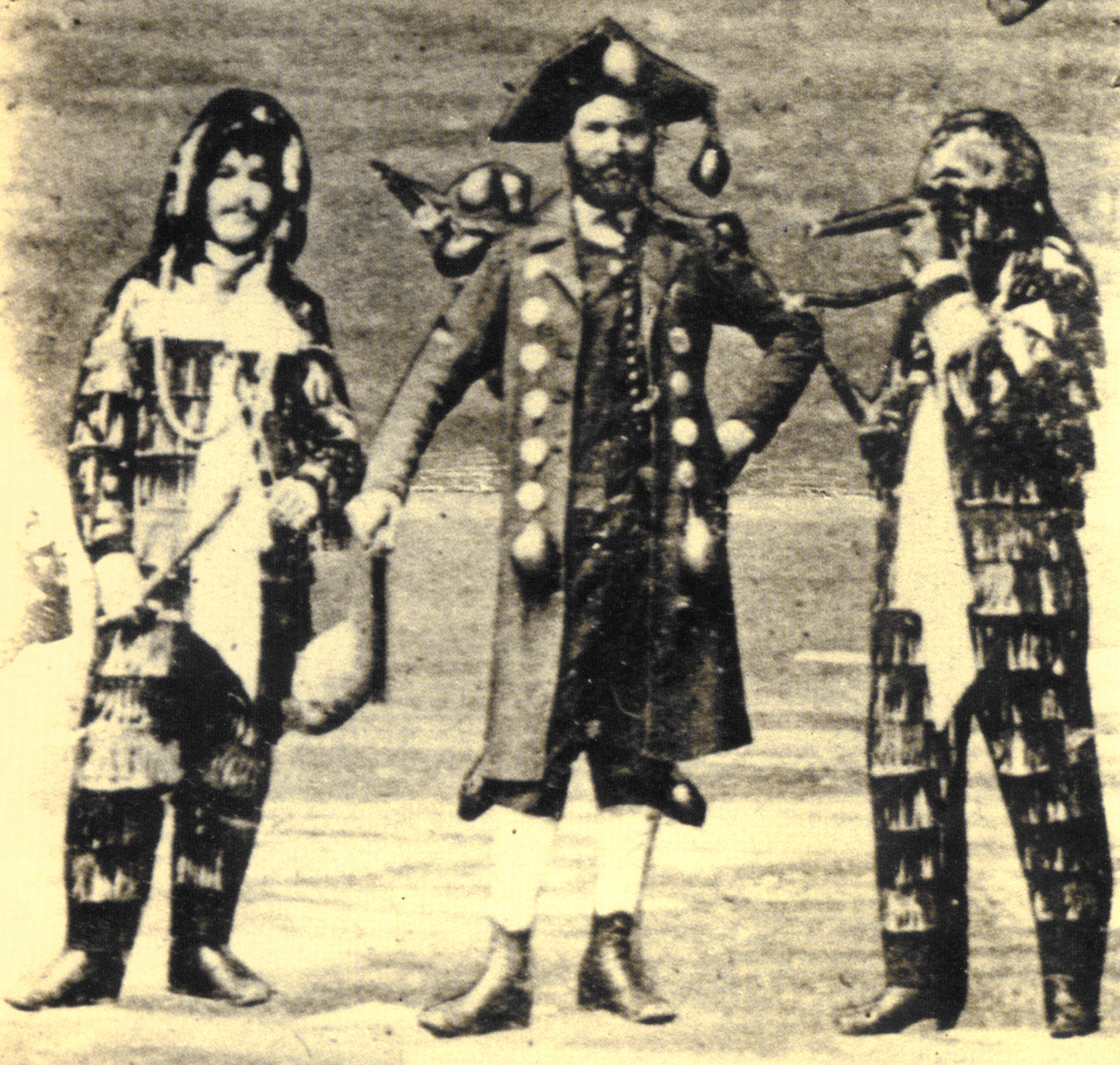 Überlingen: zwei Hänsele und ein Schwertletänzer auf dem zugefrorenen Bodensee 1880